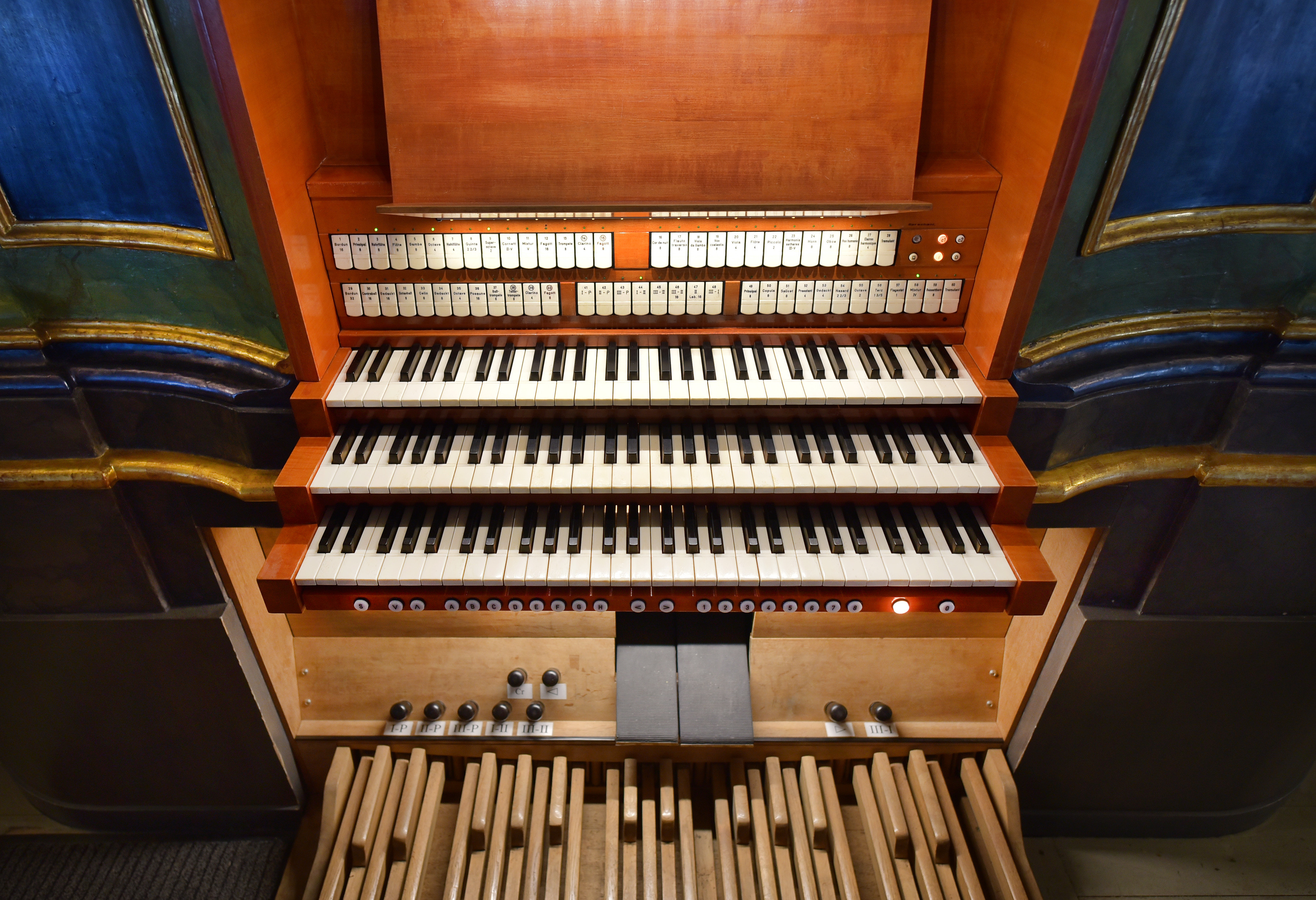 Der Spieltisch der Woehl-Orgel in der Pfarrkirche Mariä Himmelfahrt (Prien am Chiemsee)